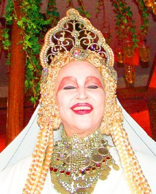 Elke Maravilha, Brazilina Actress